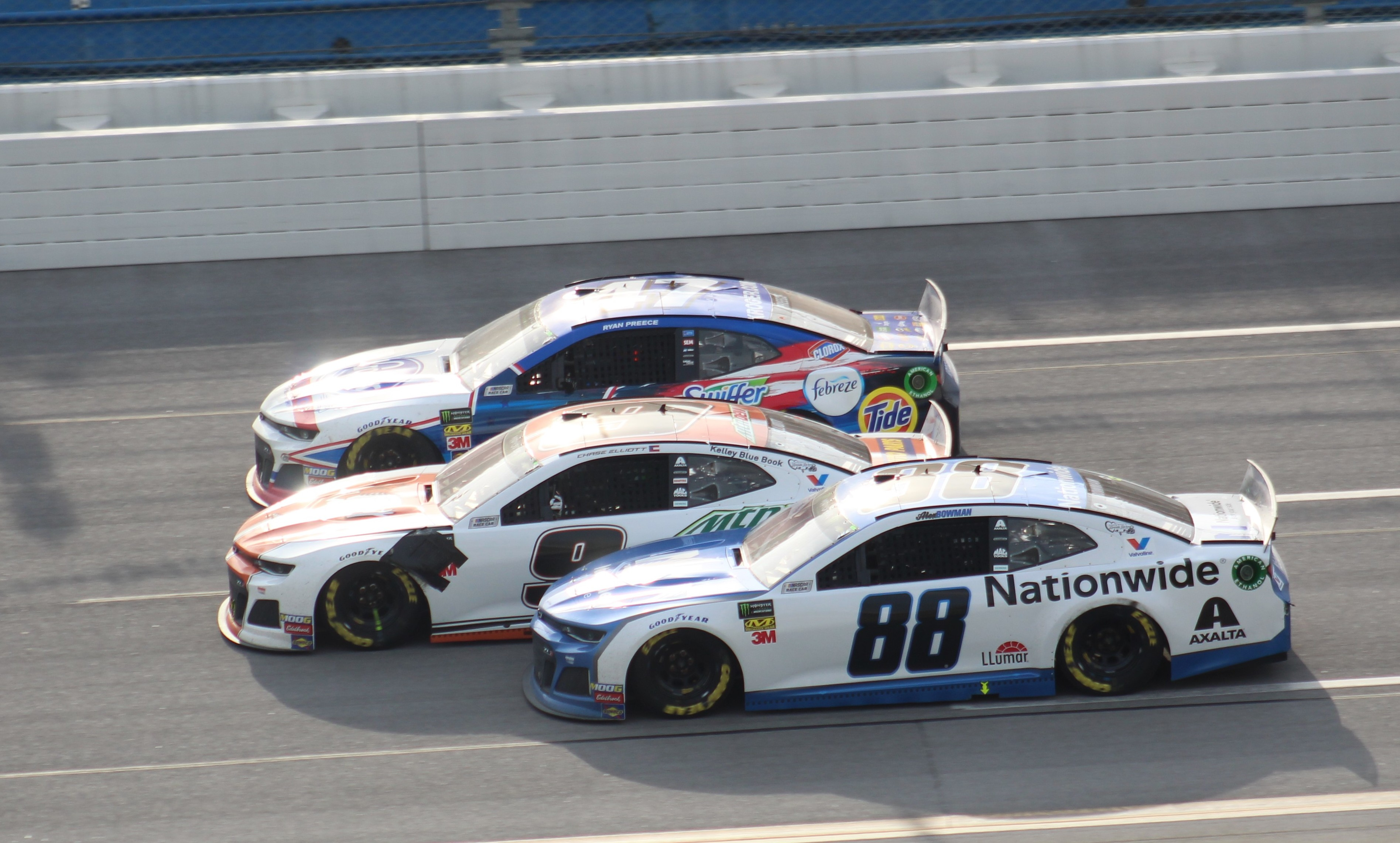 2019 GEICO 500